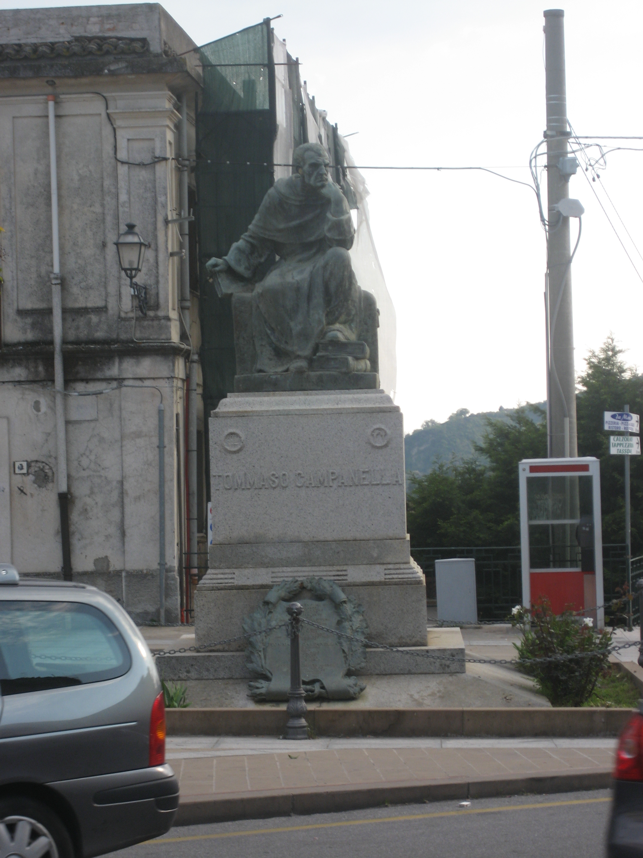 Statua di Tommaso Campanella a Stilo